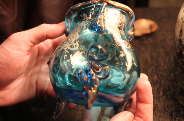 Vase d'Auguste Jean. Verre. Réalisé entre 1877 et 1884. H. 13,5 cm. Collection privée.